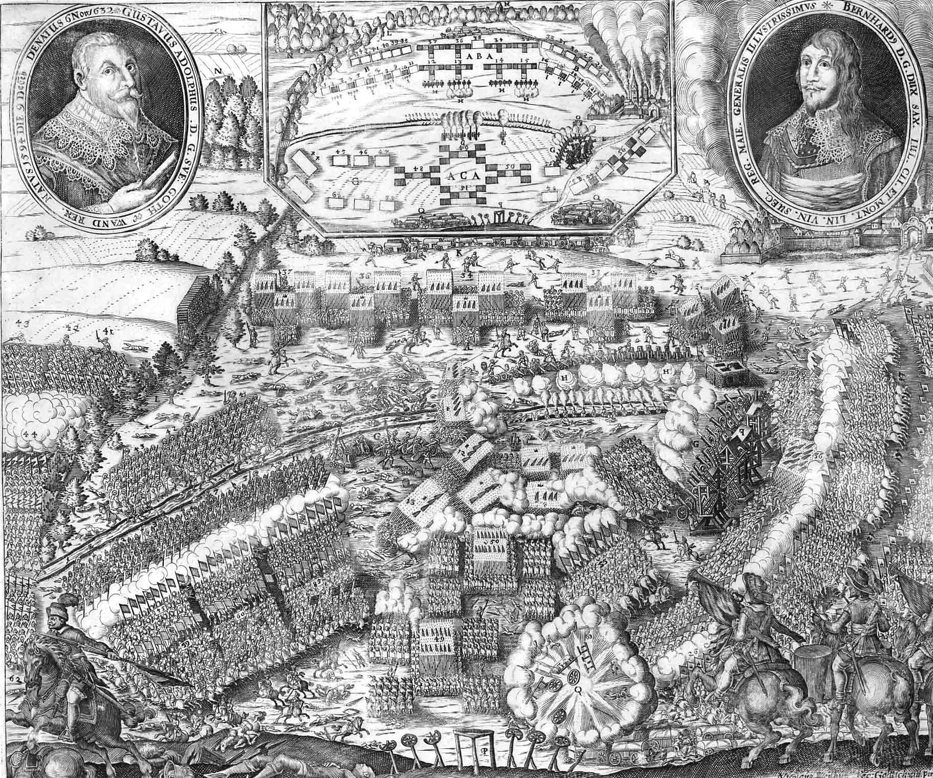 Detail aus einem Flugblatt zur Schlacht bei Lützen am 6. November 1632, Titel: Eigendliche Abbildung und Warhafftige Beschreibung der grossen und blutigen Schlacht/ so zwischen Königl. Maj. zu Schweden und dem Keyserl. General von Wallenstein/ den 6. Novembris, Anno 1632. bey dem Städtlein Lützen/ 2. Meil von Leipzig vorgangen